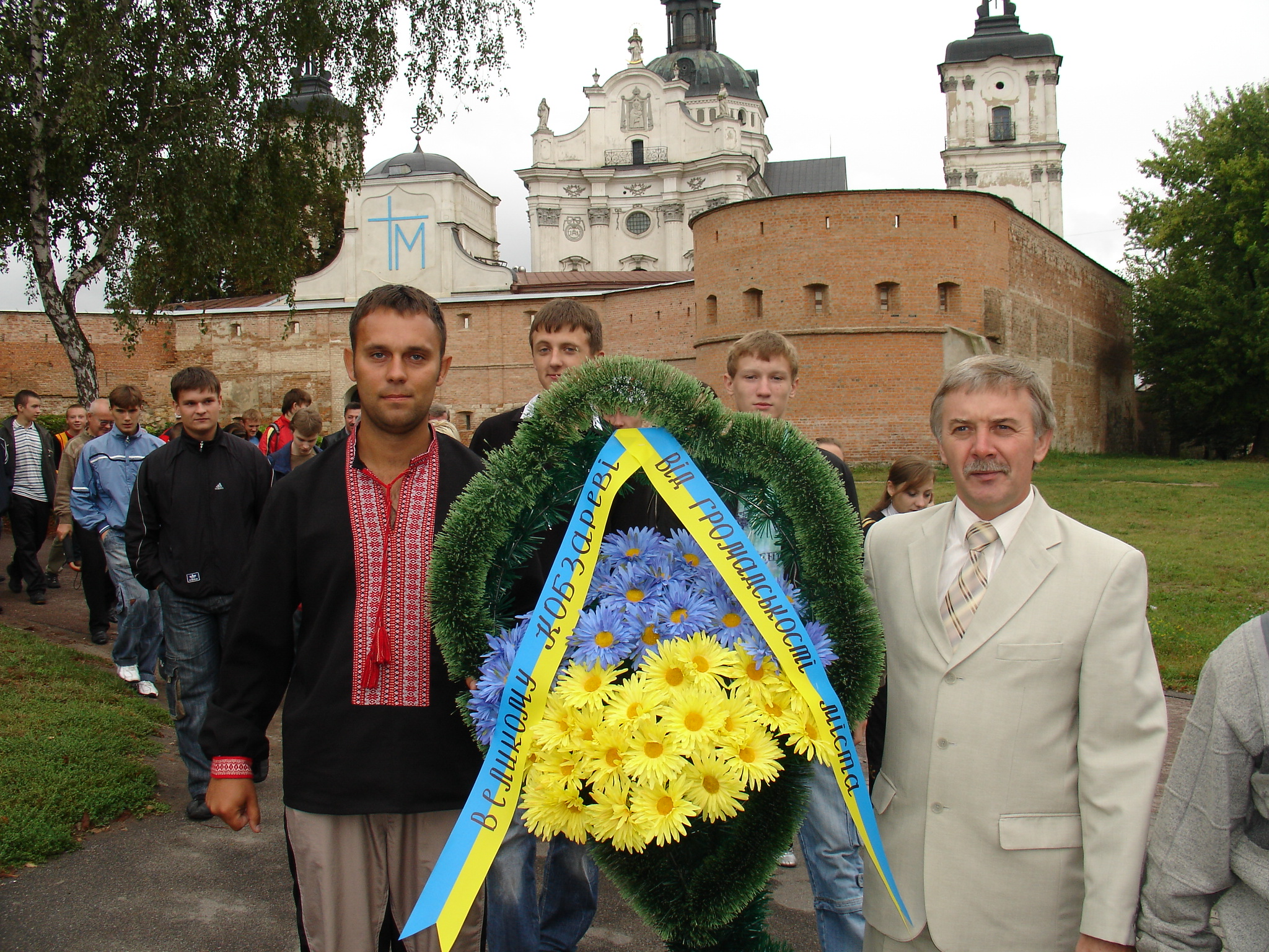 Тарасів дороговказ (2008) - Бердичів